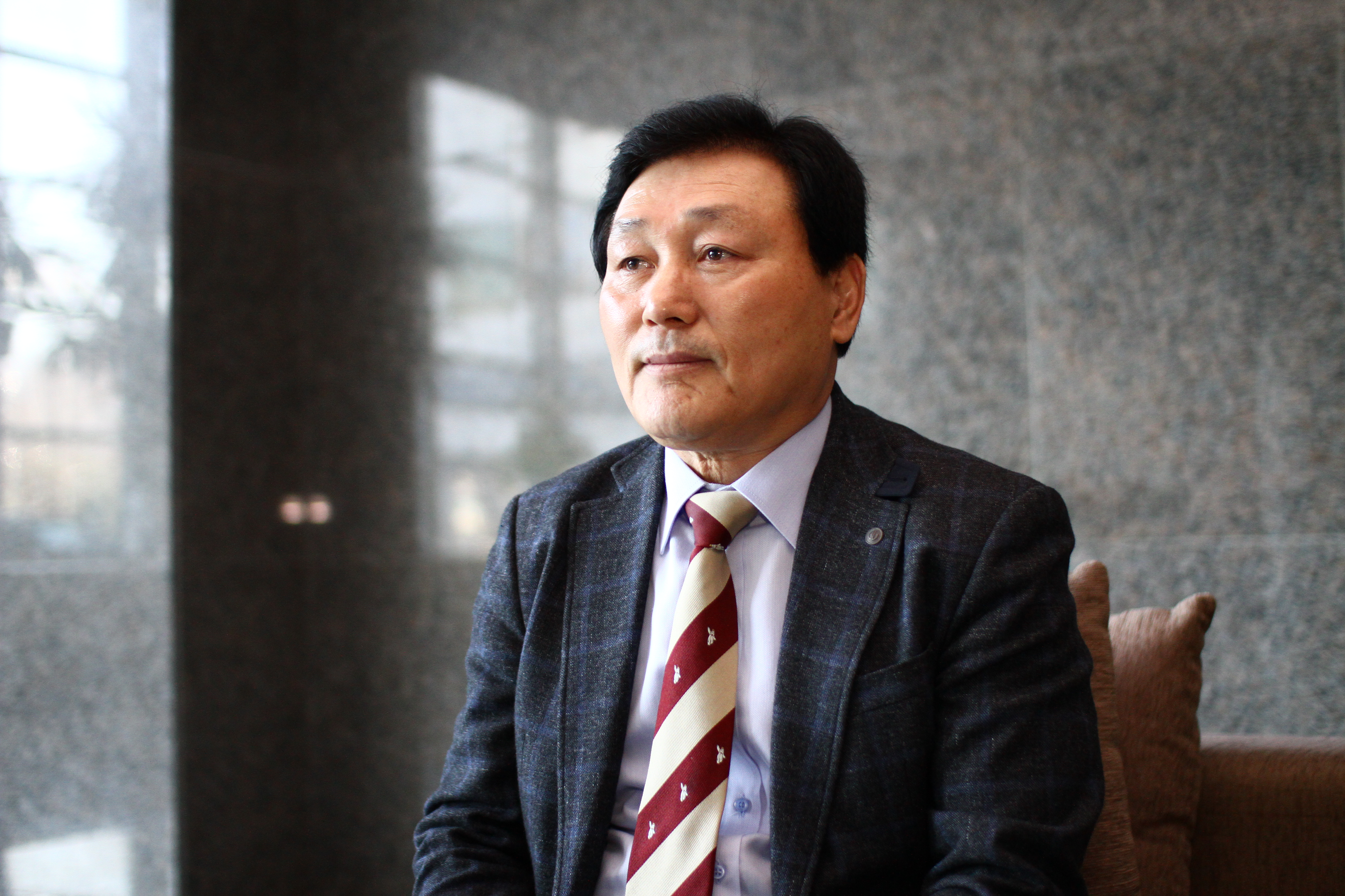 According to Commons:OTRS, I have received permission from the author(Fire Prevention News). Fire Prevention News has entrusted Choe Kwangmo with the right to upload any images it publishes to Commons under a free license. Declaration of consent(sent to )